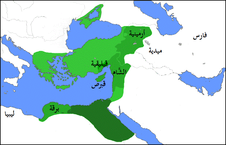 خارطة تُبيِّن الممالك التي ضُمَّت إلى مصر البطلميَّة. الأخضر الداكن يُظهر المناطق التي كانت تحكمها كليوپترا في الأساس. أمَّا المناطق الخضراء الأبهت لونًا فتُظهر المناطق التي كانت خاضعة لِروما ومن ثُمَّ منحها مارك أنطوني إلى كليوپترا وذُرِّيتها. ضُمَّت قبرص إلى مصر حيثُ حكمتها كليوپترا وقيصرون. وقُسِّمت باقي المناطق إلى ثلاث ممالك: أُعطيت أرمينية (ومعها ميدية وفارس التي كان ينوي فتحها) إلى أنطوني وولده الإسكندر؛ أُعطيت برقة (ومعها ليبيا التي كان يحُمها أوكتاڤيان) إلى ابنته كليوپترا سيلينا؛ وأُعطيت الشَّام بما فيها فينيقيا، إلى جانب قيليقية على ساحل الأناضول، إلى ابنه بطليموس فيلادلفوس. أمَّا المناطق الخضراء الأكثر بُهتانًا فهي المناطق الرومانيَّة الأُخرى الخاضعة لِأنطوني والتي لم يتنازل عنها.